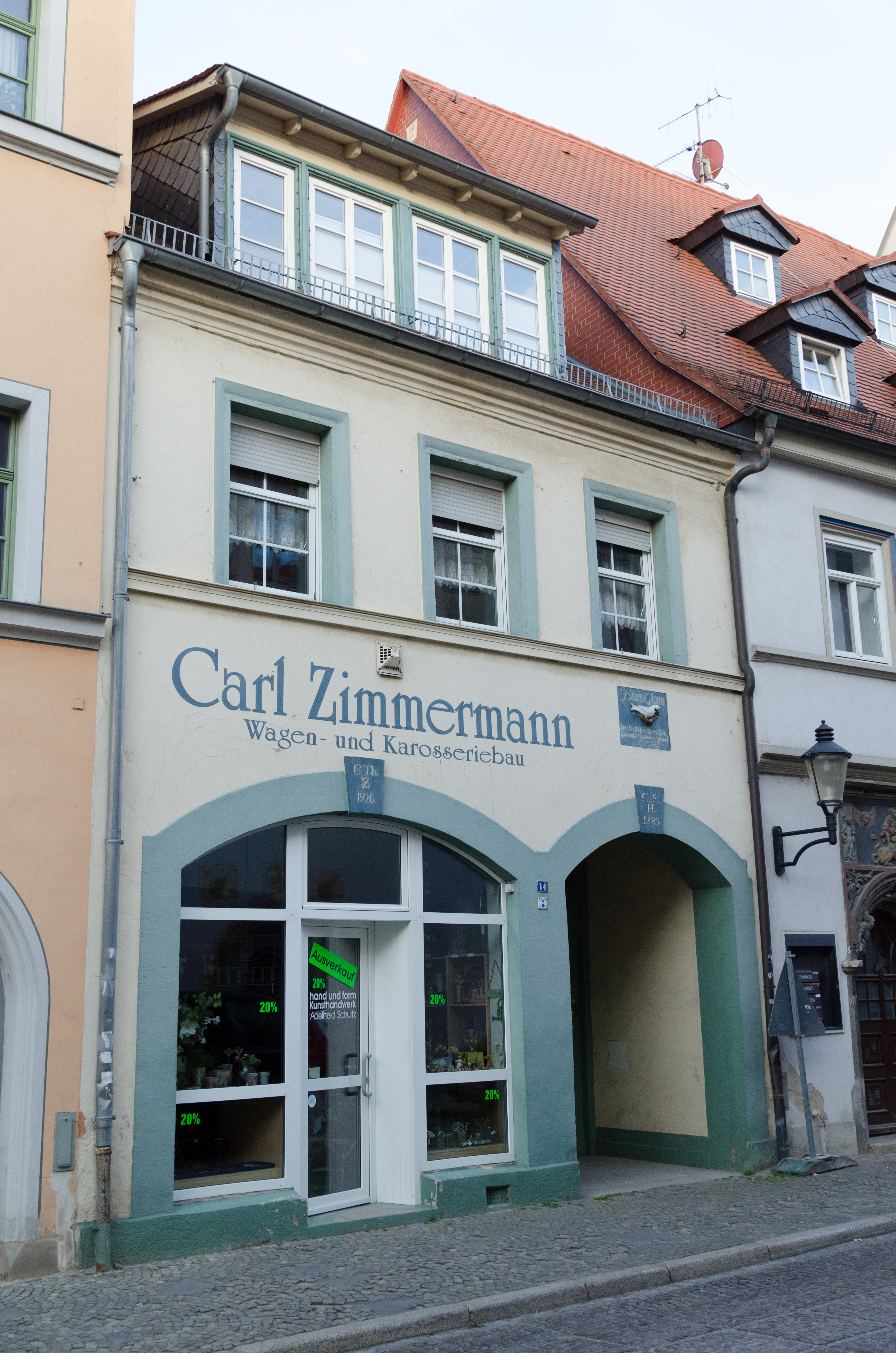 Naumburg, Marienstraße 14